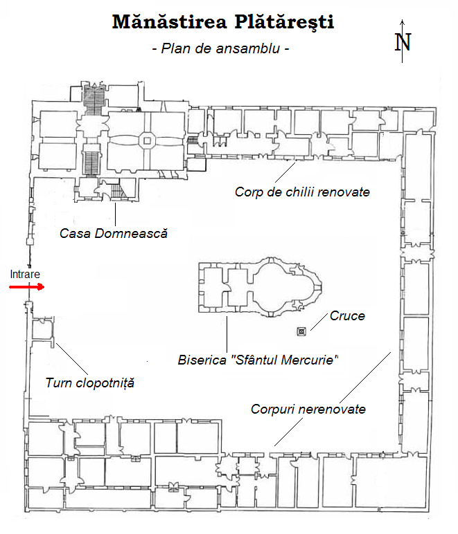 Mănăstirea Plătăreşti - plan de ansamblu